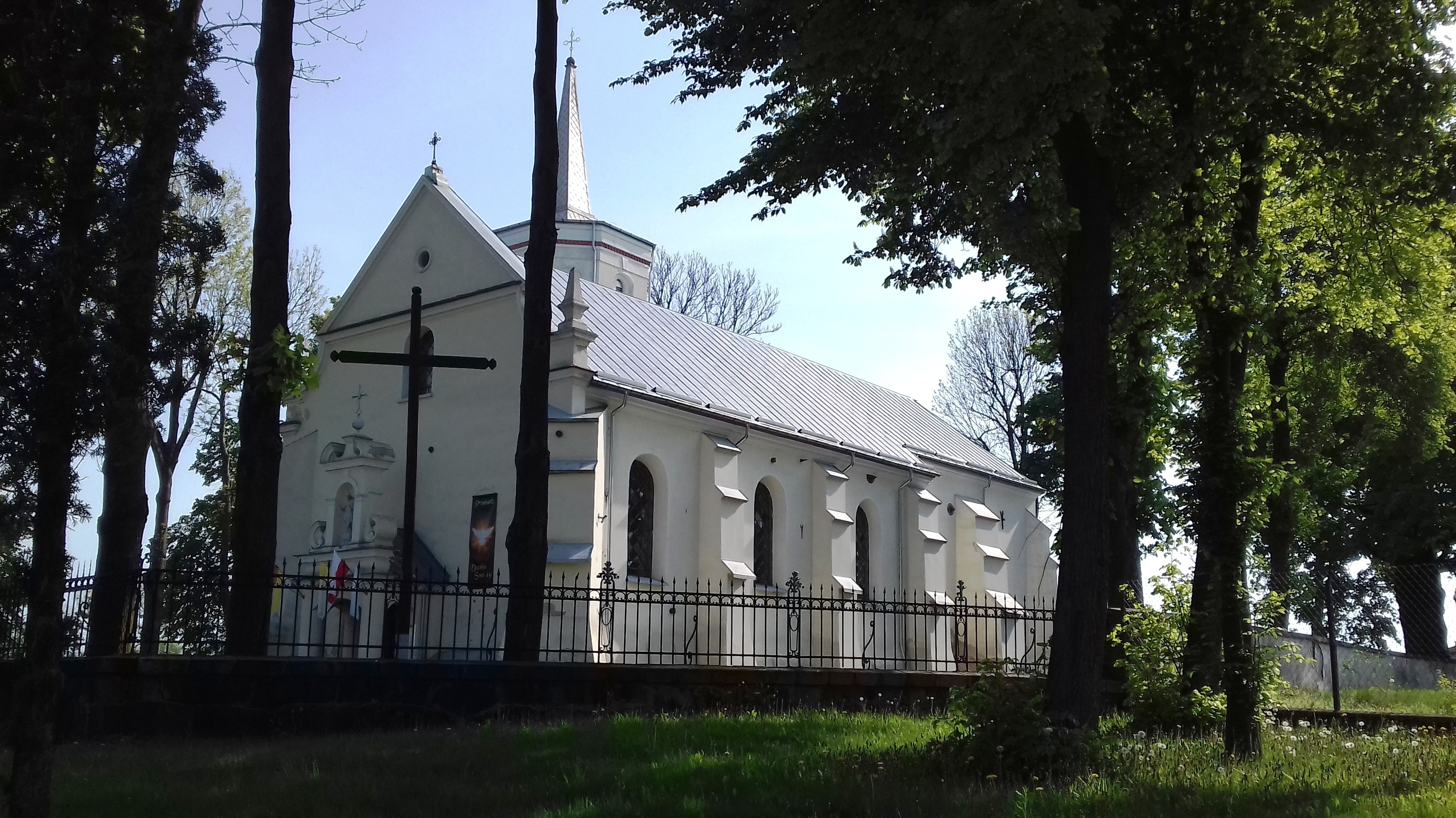 Cieksyn (gm. Nasielsk, pow. Nowy Dwór Mazowiecki) - kościół Św. Doroty